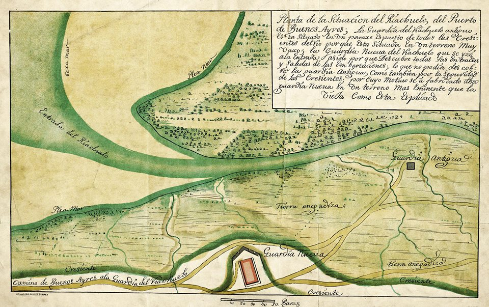 Antigua y Nueva guardia del Riachuelo de Buenos Aires.